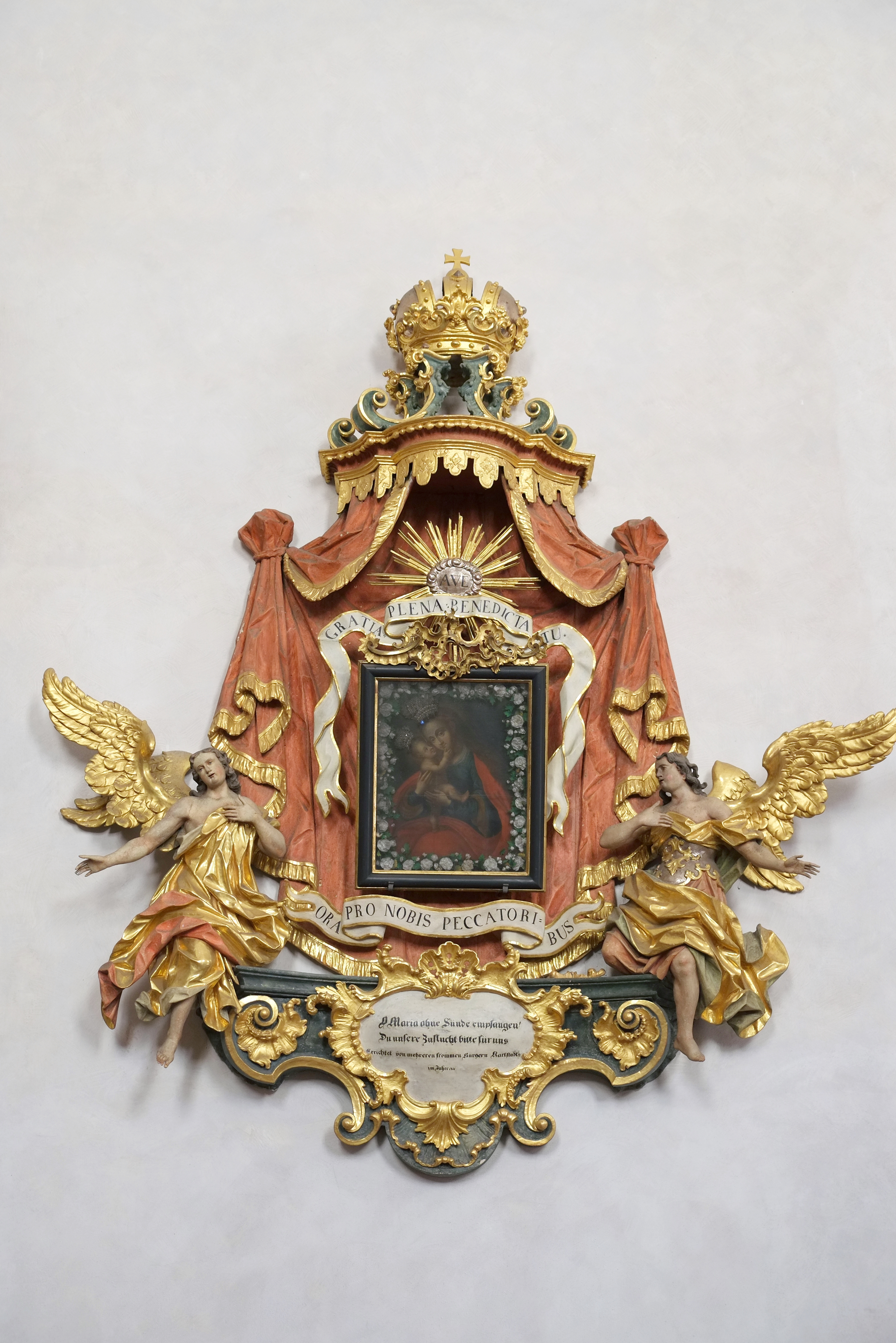 Spitalkirche in Karlstadt im Main-Spessart-Kreis (Bayern, Deutschland)